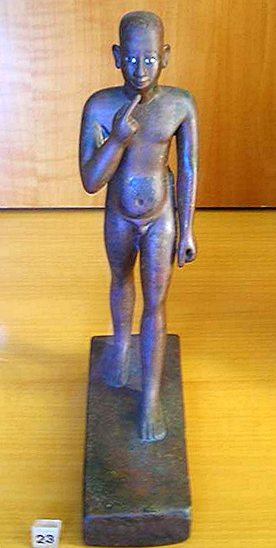 statuette d'Horus enfant, Basse Epoque